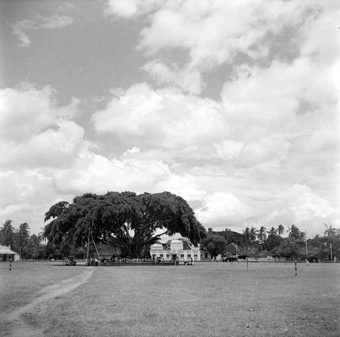 Negatief. Het stadsplein te Madioen, Oost-Java